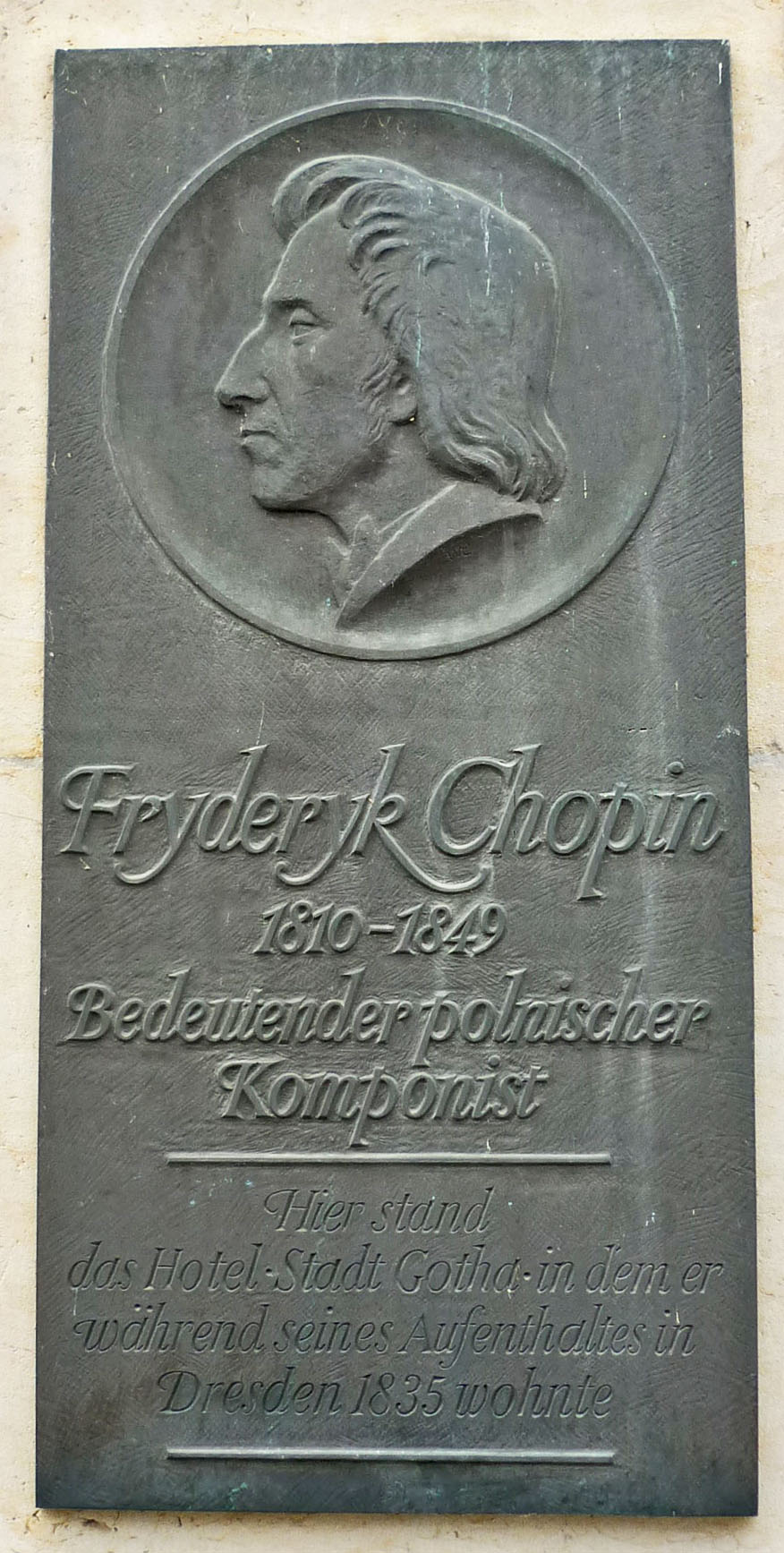 Gedenktafel für Frederik Chopin (1810-1849) Hier stand das Hotel Stadt Gotha, in dem er während seines Aufenthaltes in Dresden 1835 wohnte